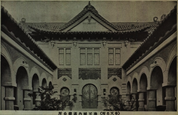 南満洲鉄道奉天公所（愛知大学 国際中国額研究センター「中国戦前絵葉書データベース」奉天の印象B より）